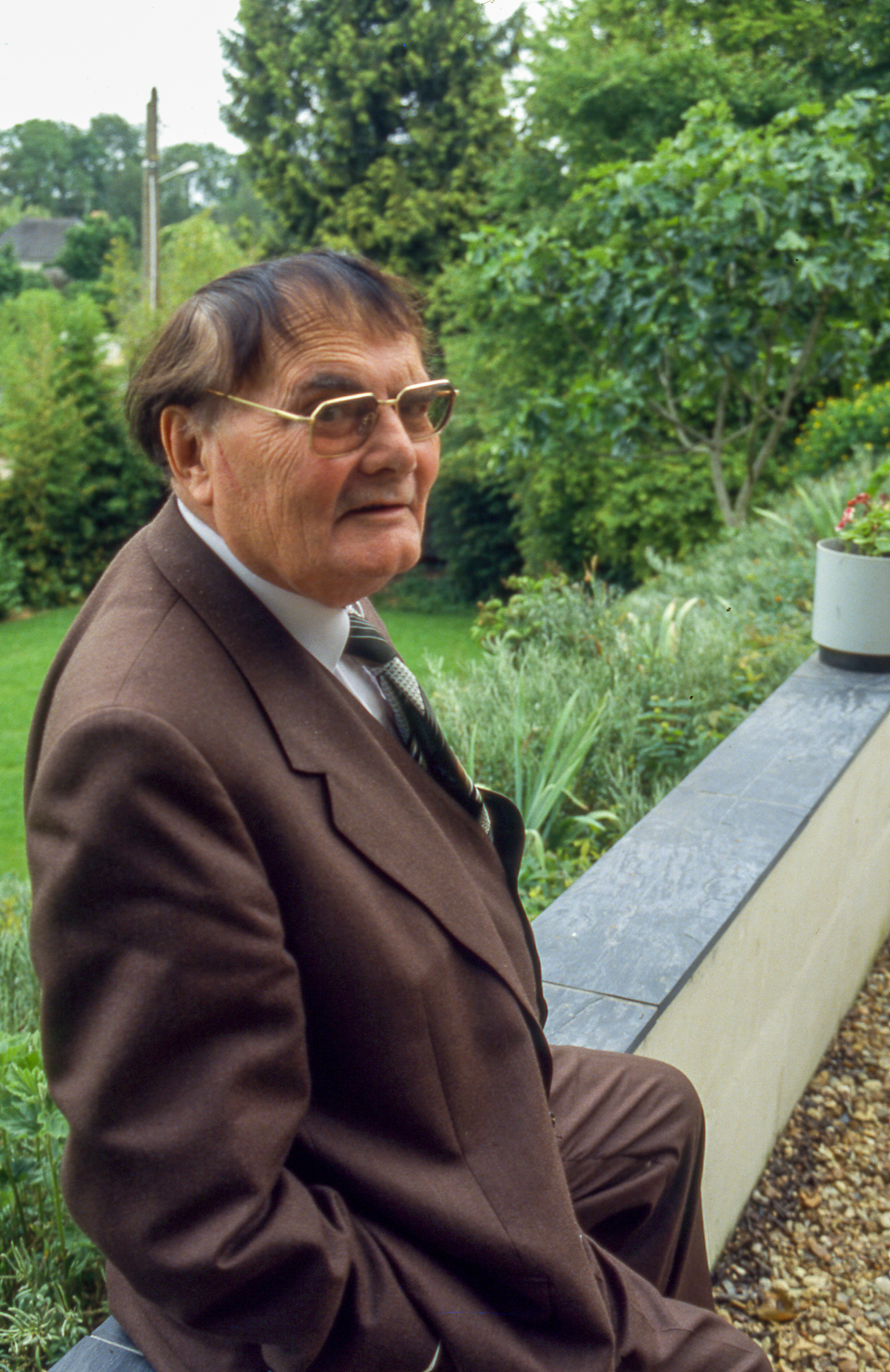 En 1992, le Président des Goncourt était revenu vivre sur les bords de la Loire, en Anjou.